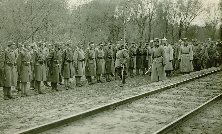 Besichtigung der Ehrenkompanie (28.E.K.) durch den K.u.k. Kriegsminister FZM Alexander Freiherr v. Krobatin und ObLt.Felix v.Tarbuk-Sensenhorst (Kompaniekommandant) bei der Einweihungsfeier für die wiedererrichtete Eisenbahnbrücke über die Weichsel bei Iwangorod im April 1916